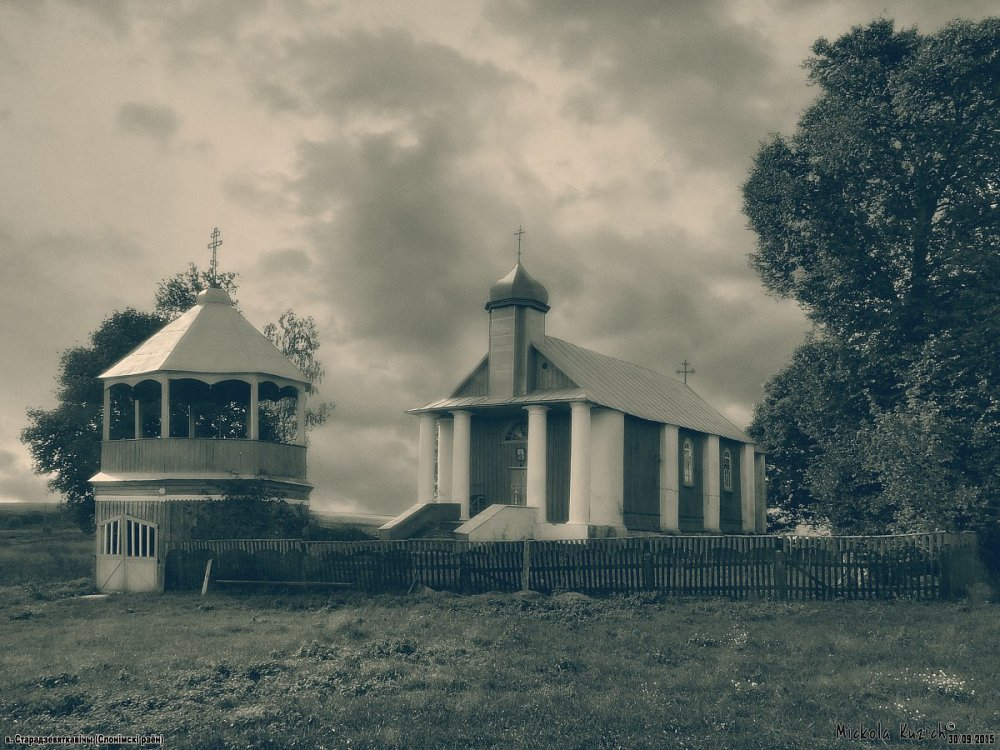 Старадзявяткавічы. Свята-Параскева-Пятніцкая царква